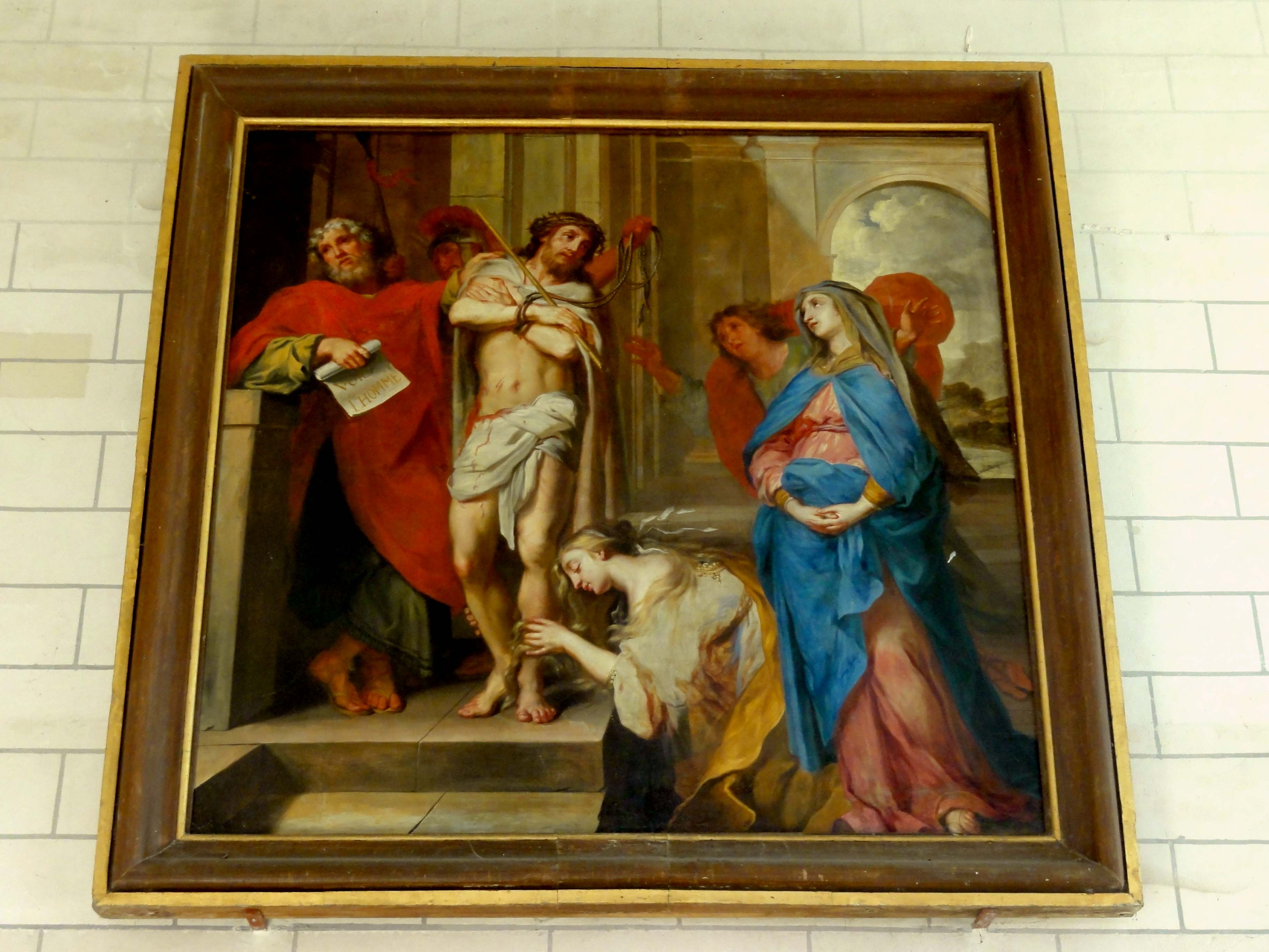 Tableau - Ecce homo ou Jésus rencontre les femmes de Jérusalem (9e station du chemin de croix selon Jean-Paul II).